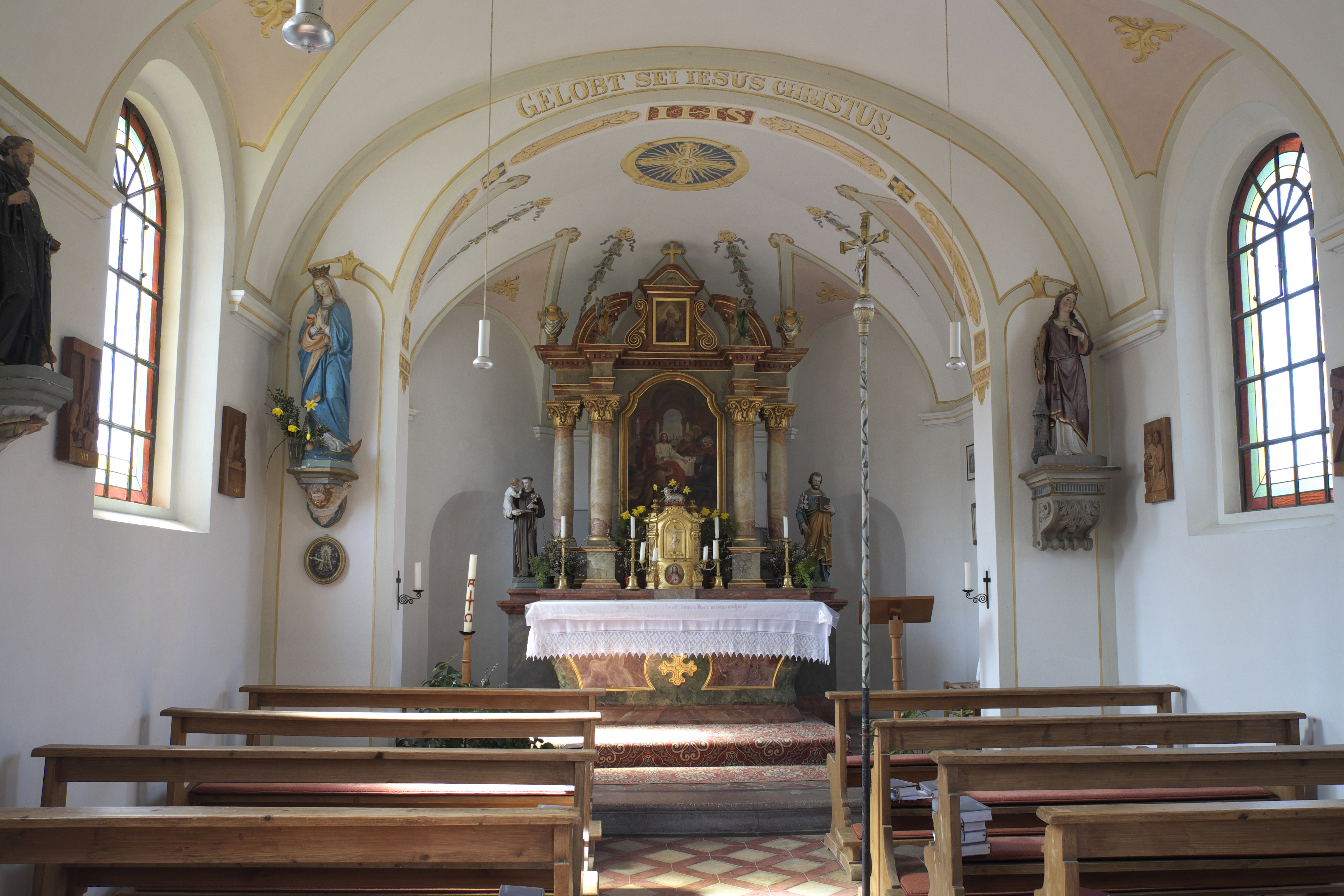 Kapelle St. Magdalena in Happerg, einem Ortsteil von Eurasburg im Landkreis Bad Tölz-Wolfratshausen (Bayern/Deutschland), Innenraum